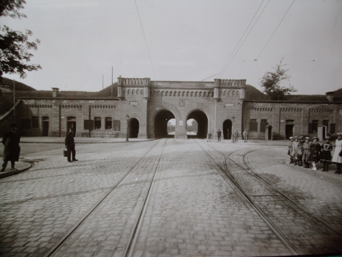 Vue sur la Porte de Schirmeck à Strasbourg vers 1919.